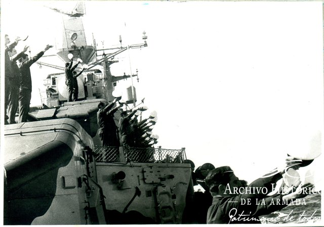 Dotación de la Escuadra Nacional, en la revista naval con la que la Armada de Chile rindió homenaje al centenario del Combate Naval de Iquique, el 21 de mayo de 1979.